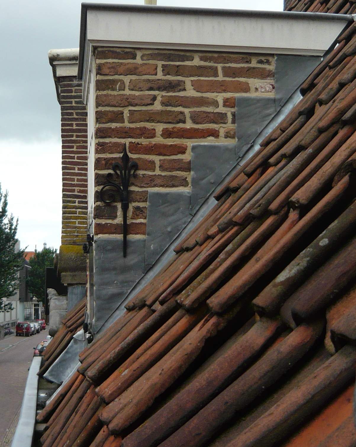 Loketten van lood bij een kleine dakkapel